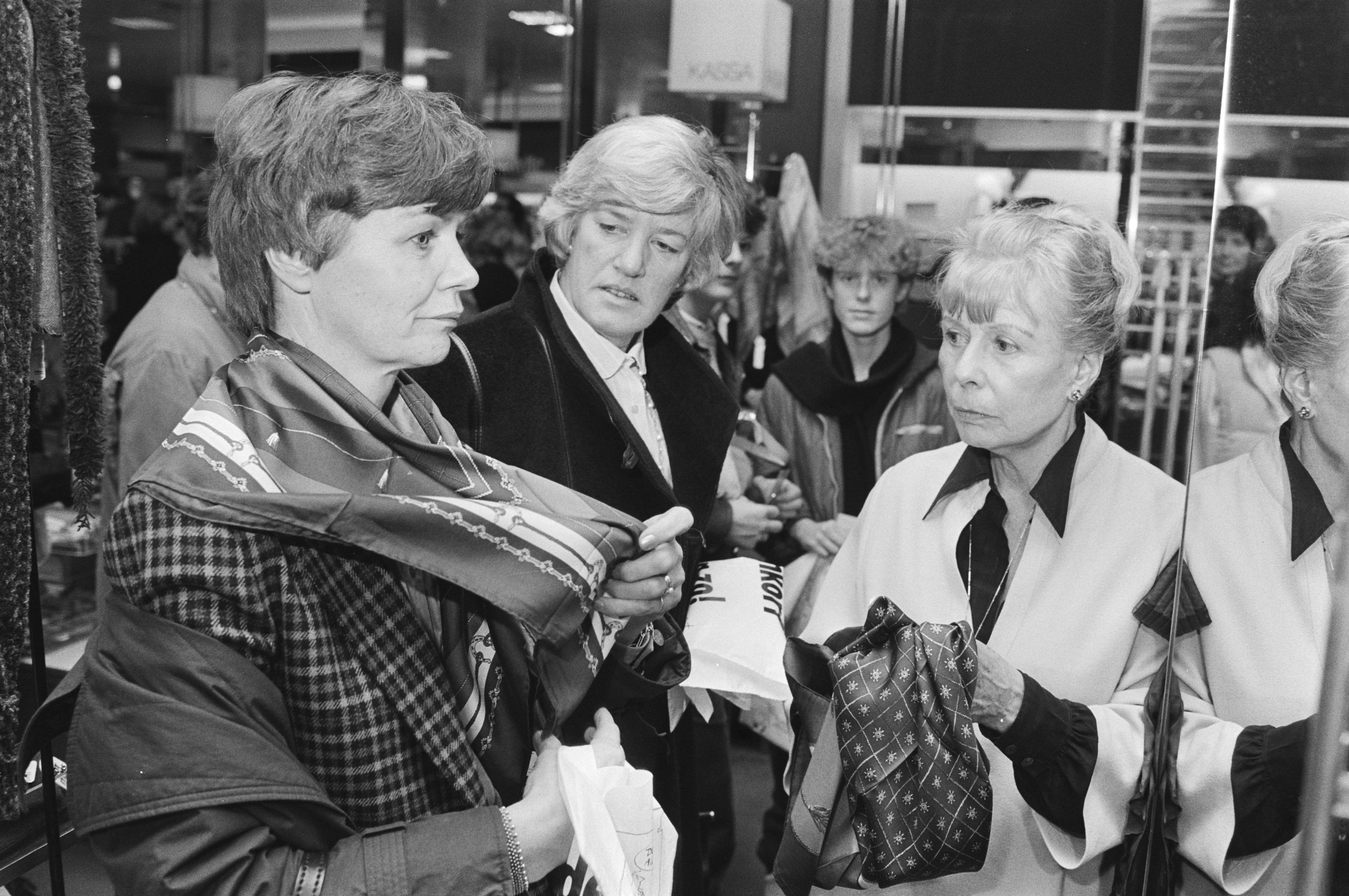 Collectie / Archief : Fotocollectie Anefo Reportage / Serie : Nationale Bijenkorfdag voor het behoud van de Bijenkorf, in Amsterdam Beschrijving : Actrice Mary Dresselhuys verkoopt shawls in de Bijenkorf Datum : 22 januari 1983 Locatie : Amsterdam, Noord-Holland Trefwoorden : acties, bedrijfssluitingen, warenhuizen Persoonsnaam : Dresselhuys, Mary Fotograaf : Antonisse, Marcel / Anefo Auteursrechthebbende : Nationaal Archief Materiaalsoort : Negatief (zwart/wit) Nummer archiefinventaris : bekijk toegang 2.24.01.05 Bestanddeelnummer : 932-4738